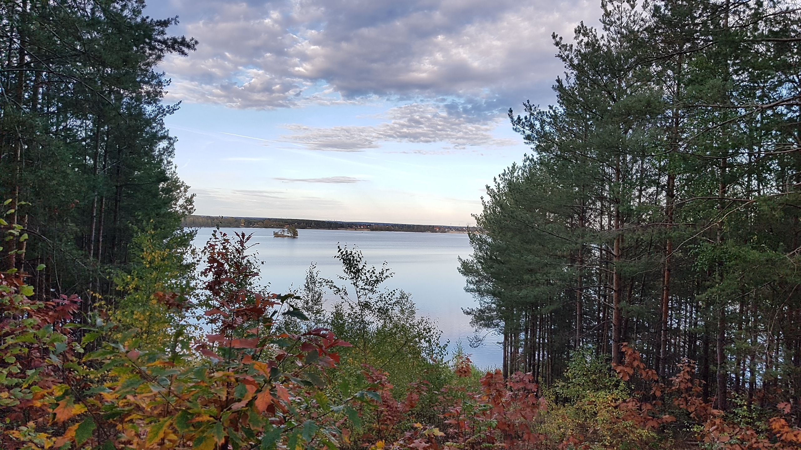 Blick auf Bergwitz und den Bergwitzsee von der Hoffmannshöhe aus.